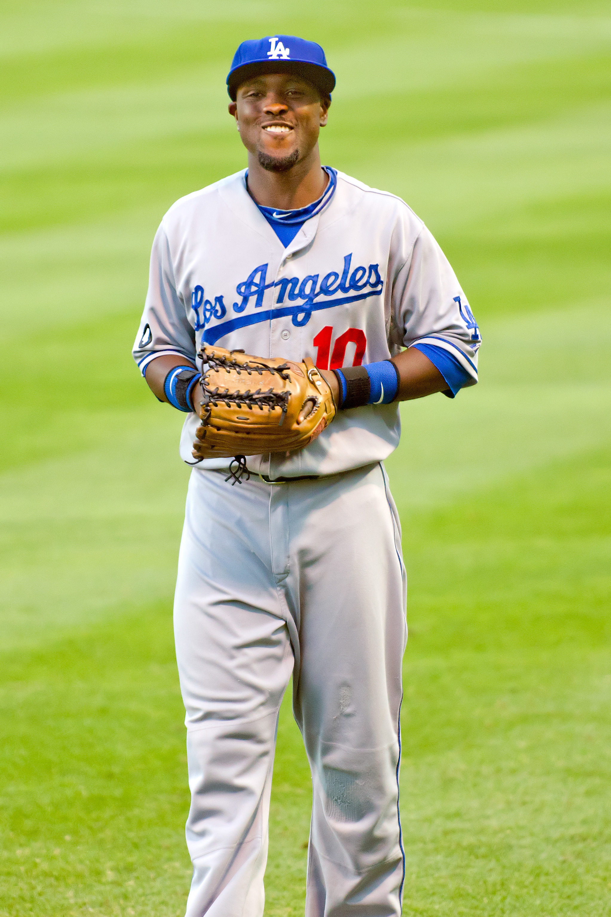 Tony Gwynn, Jr.